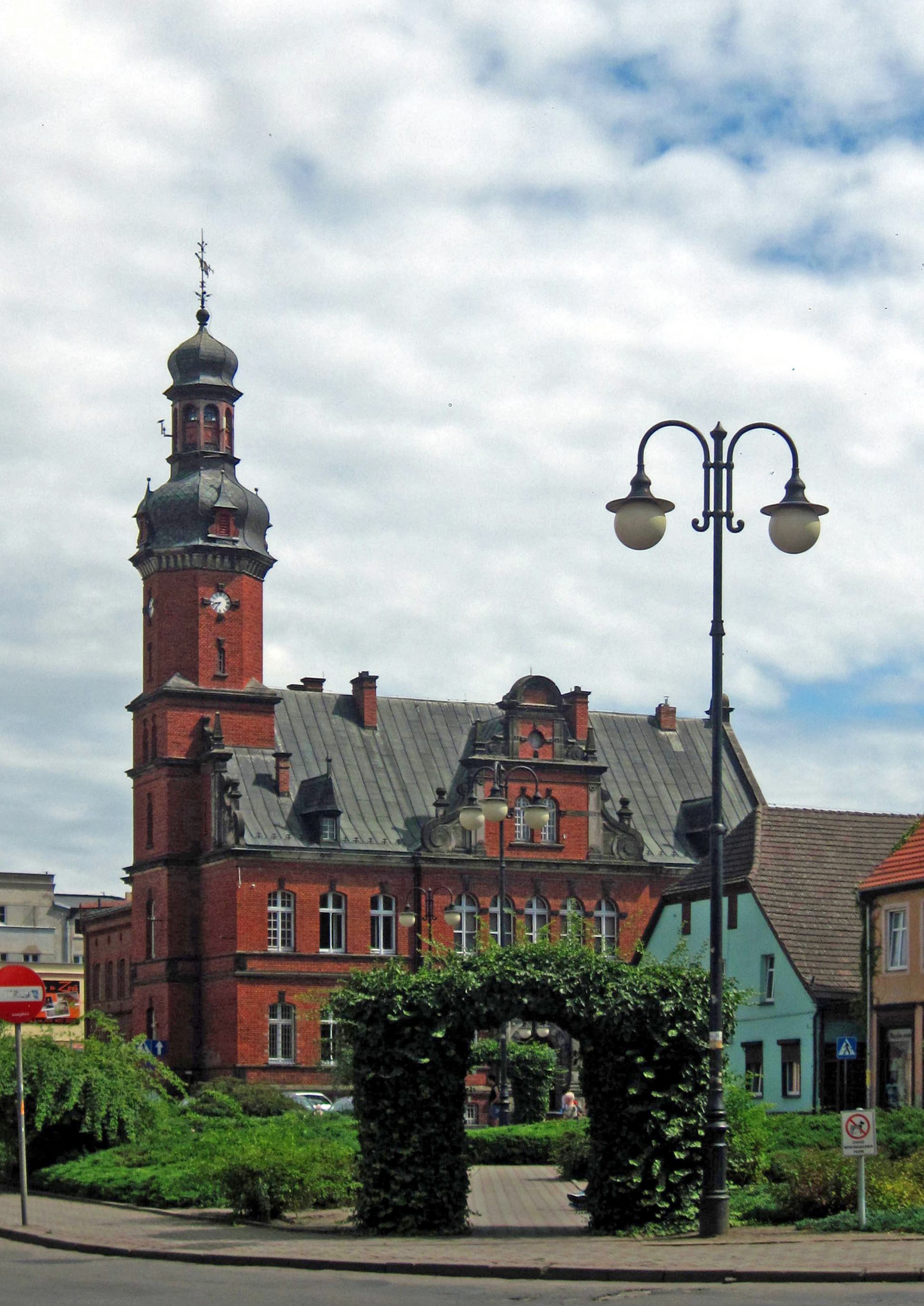 Drezdenko, Sąd Obwodowy, ob. liceum medyczne, 1885